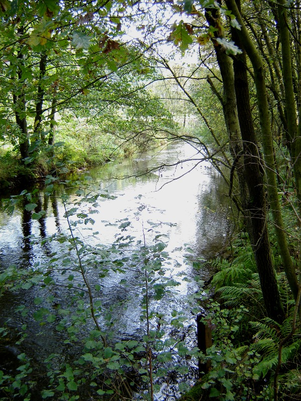 Fluss Wietze, Nebenfluss der Örtze in Niedersachsen